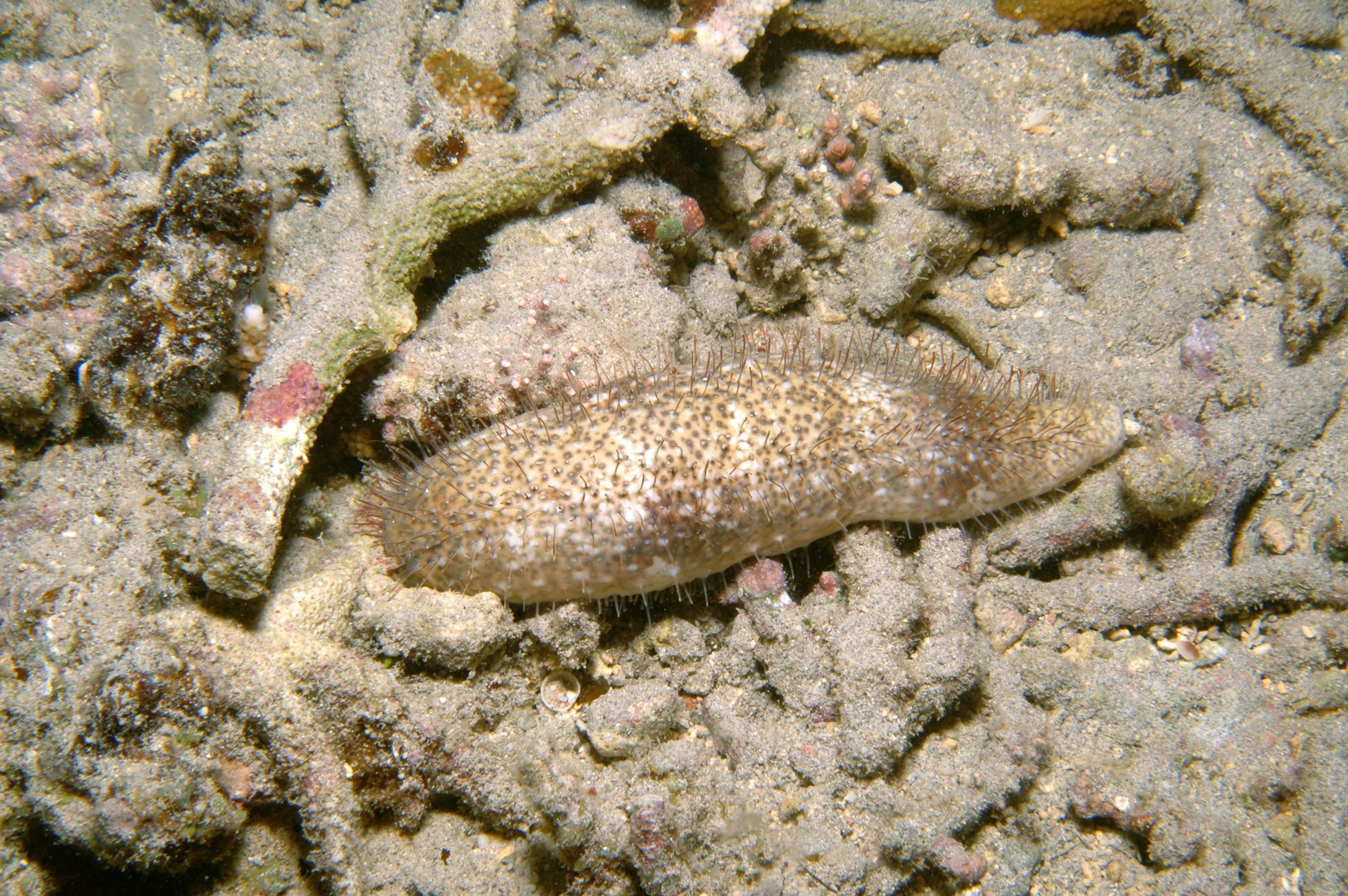 Actinopyga capillata.dREU_02576